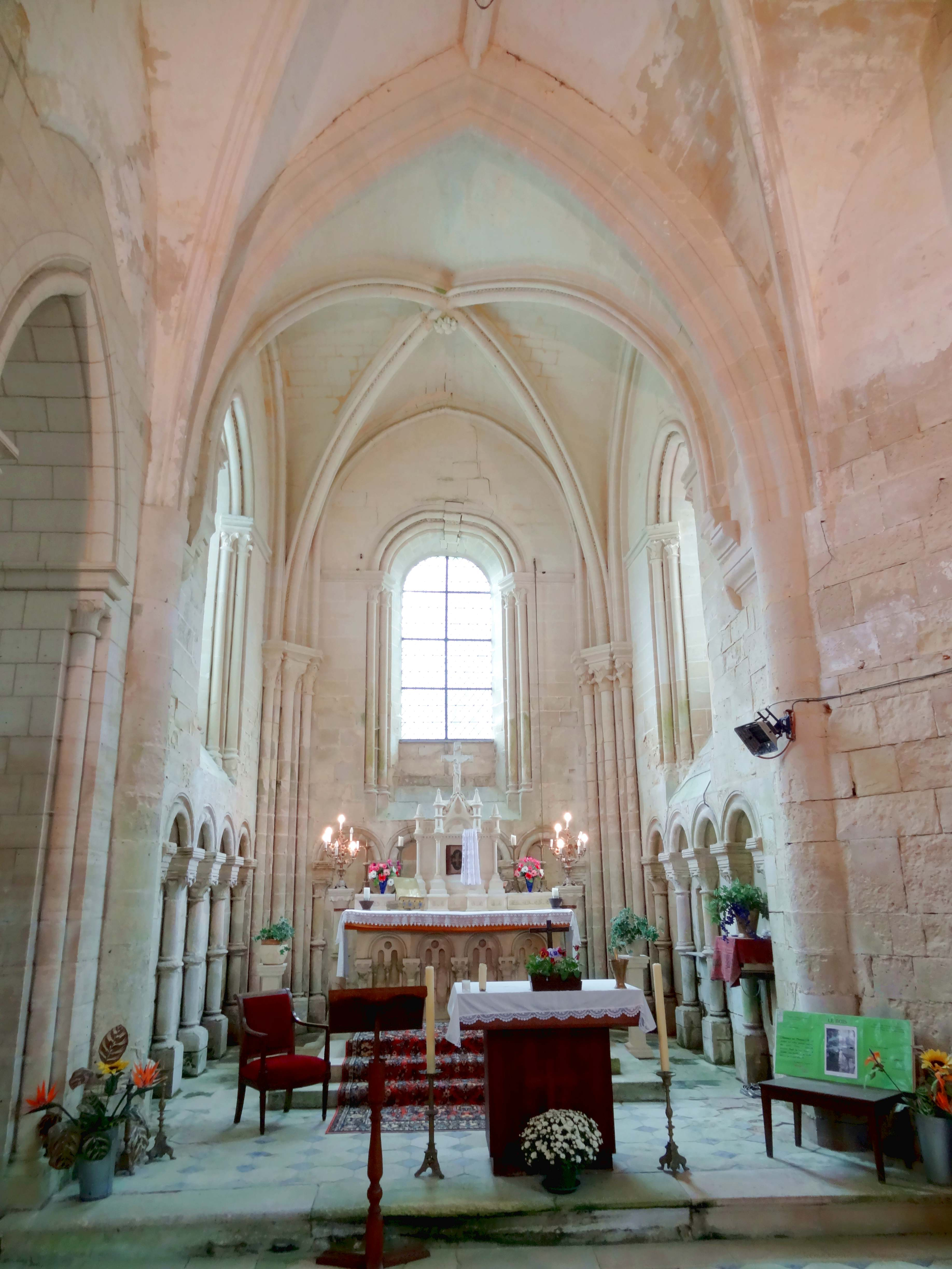 Intérieur de l'église - voir titre.